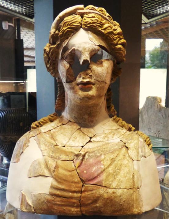 Museo archeologico regionale Paolo Orsi, la Kore rinvenuta a Piazza Vittoria, Siracusa V secolo a.C.